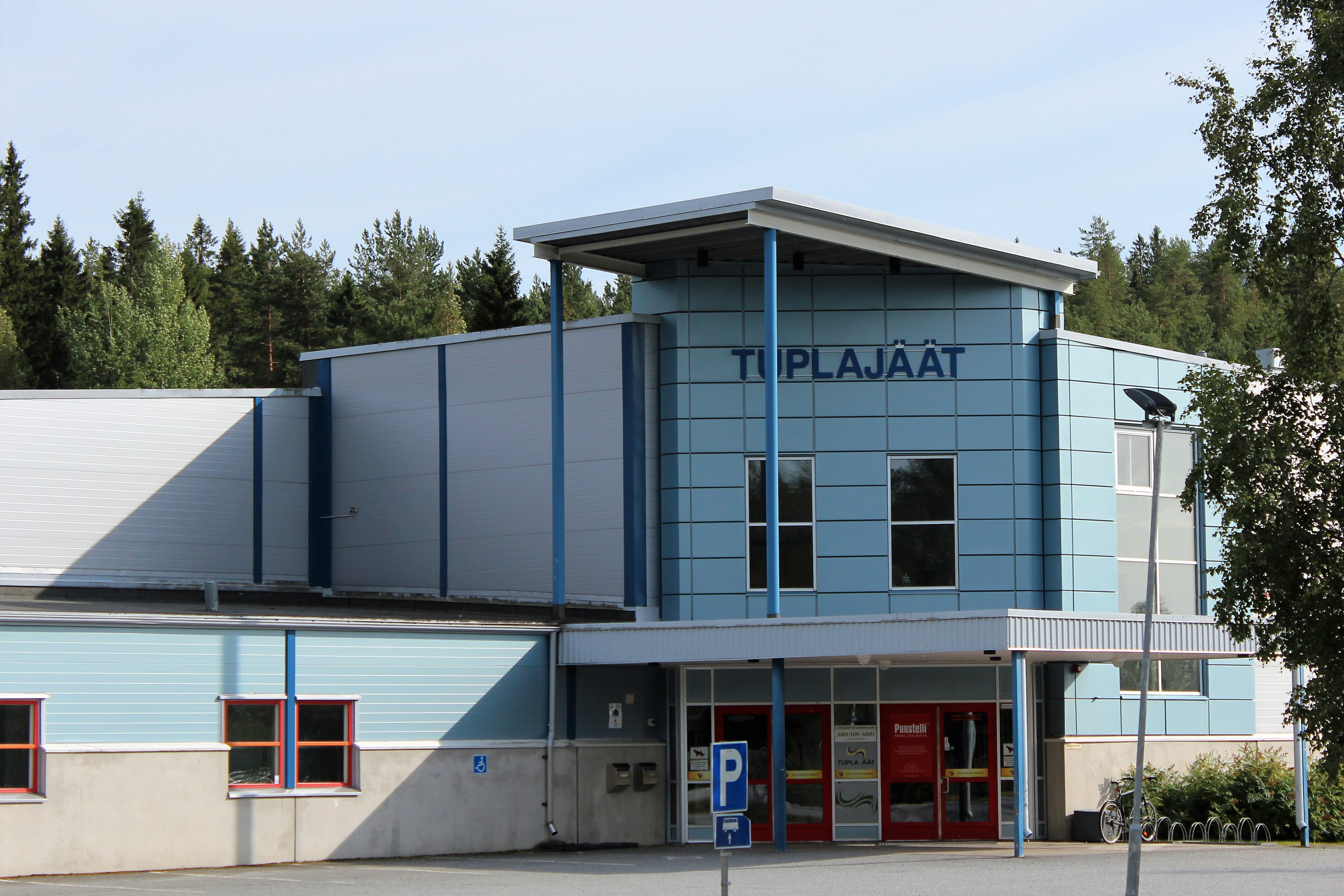 Siilinjärven Toivalassa sijaitsevat Tuplajäät jäähalli.